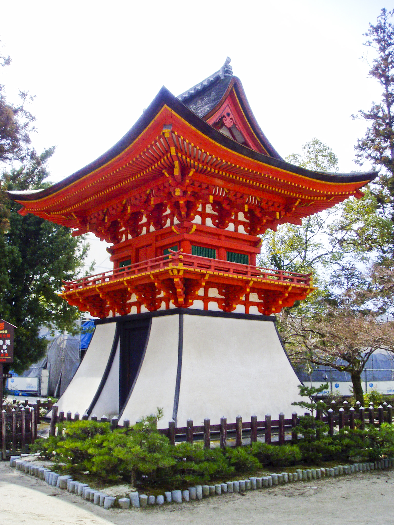 Fudoin Shoro (不動院鐘楼) in Higashi-ku, Hiroshima, Hiroshima, Japan.